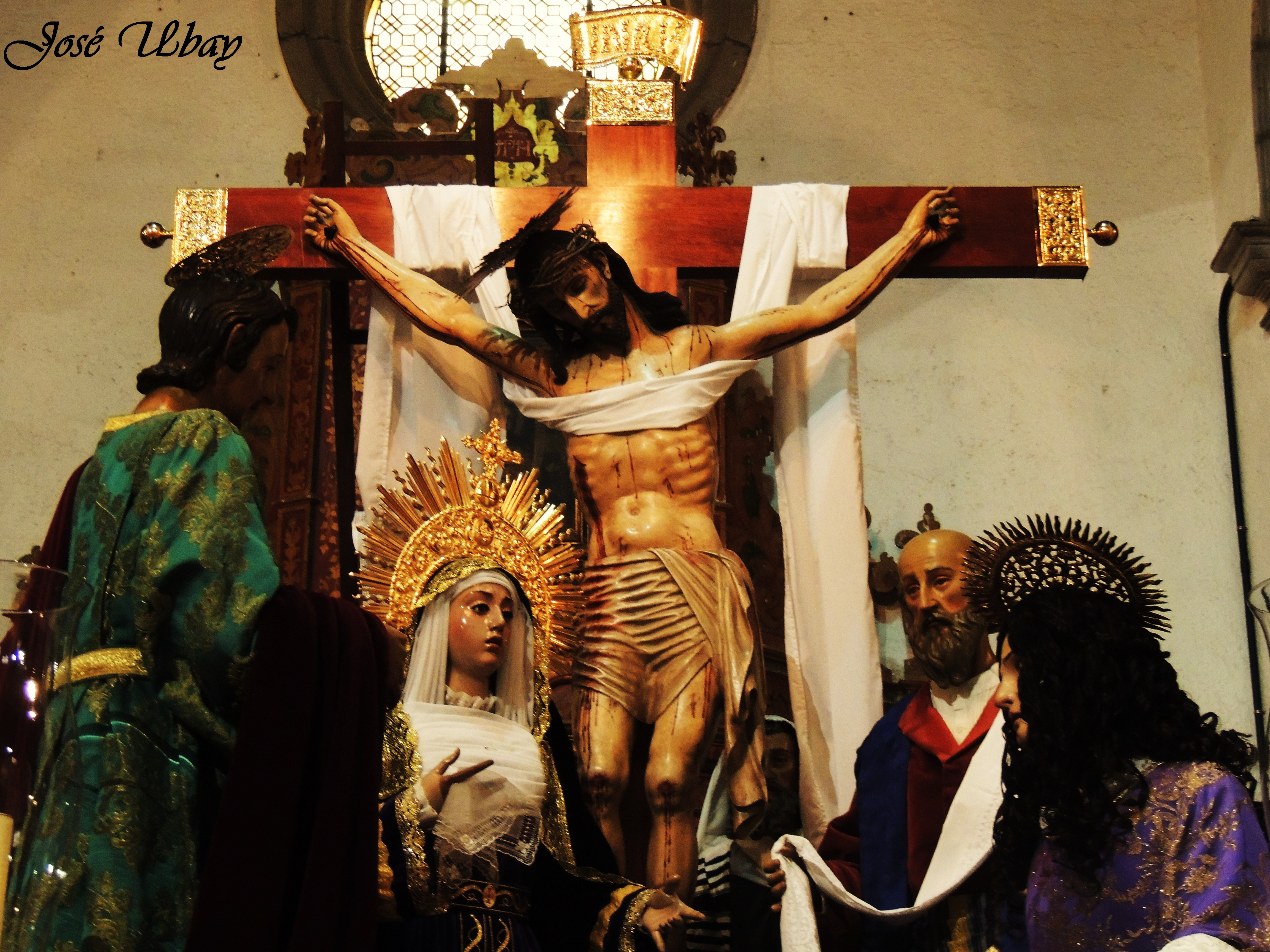 Paso procesional de la Unción y Mortaja de Cristo. Parroquia de Santo Domingo de Guzmán. San Cristóbal de La Laguna.